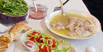 Khash (dish)